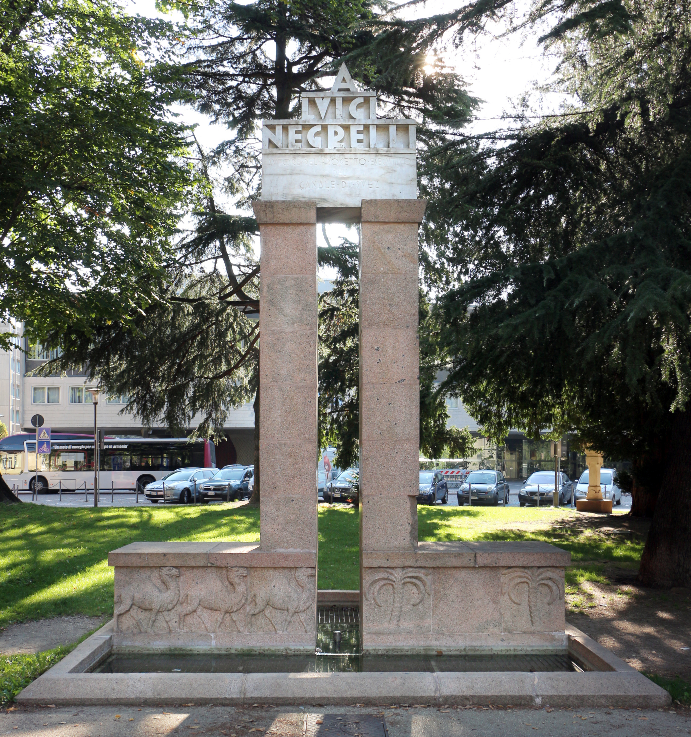 Monumento a Luigi Negrelli This is a photo of a monument which is part of cultural heritage of Italy.